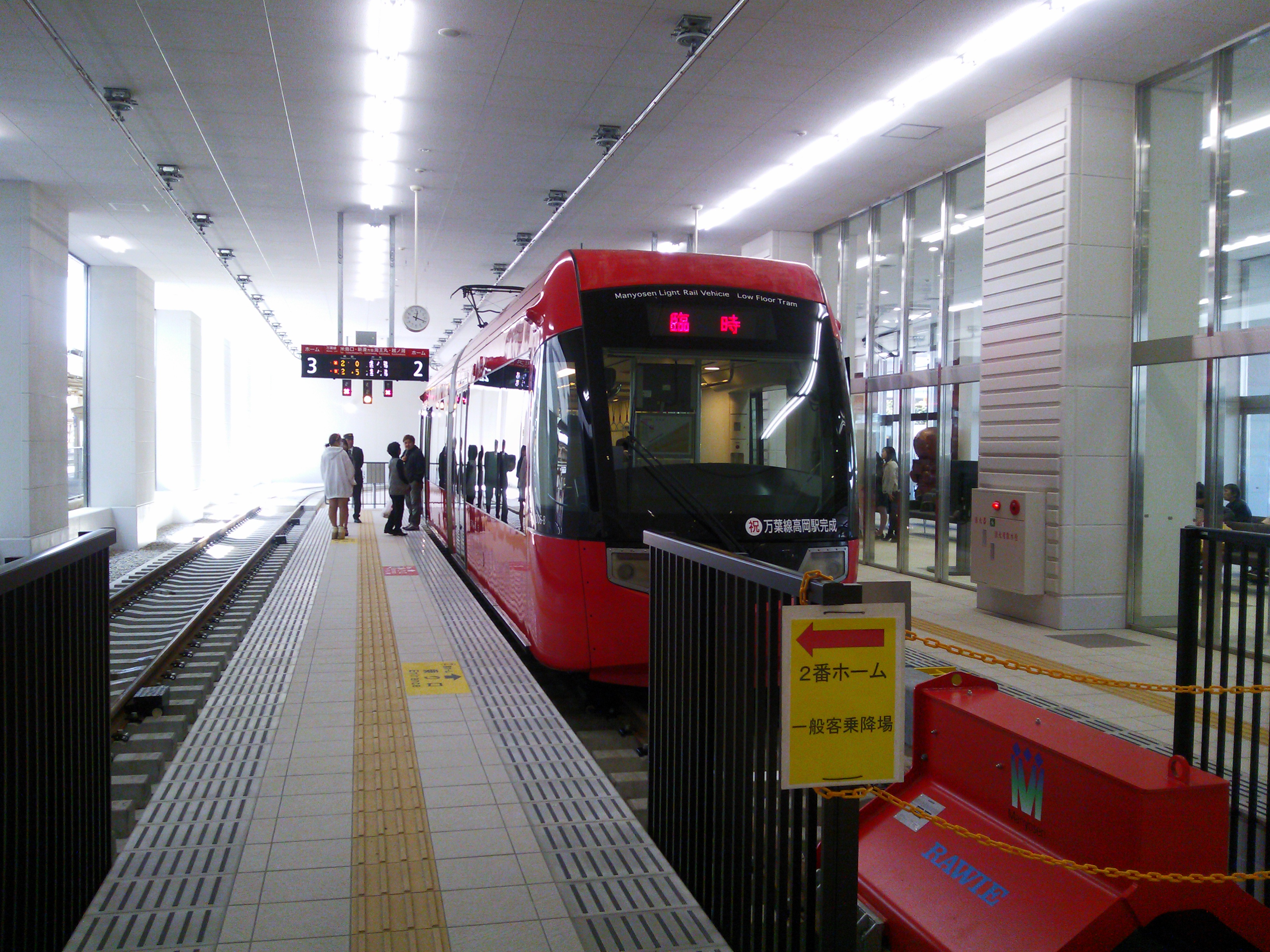 万葉線高岡駅のホーム。